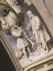 Petrus Christus Nativité de Washington